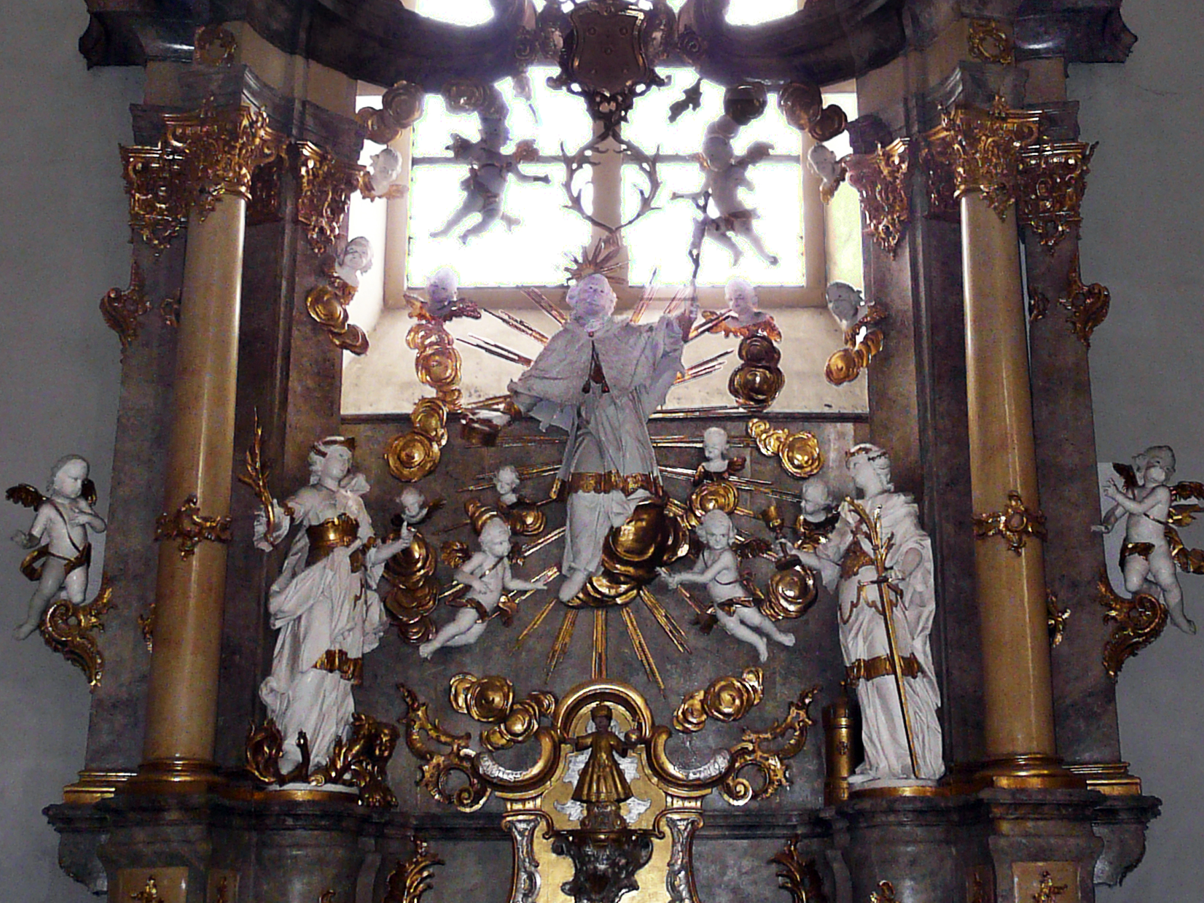 Фрагмент алтаря Св. Непомука